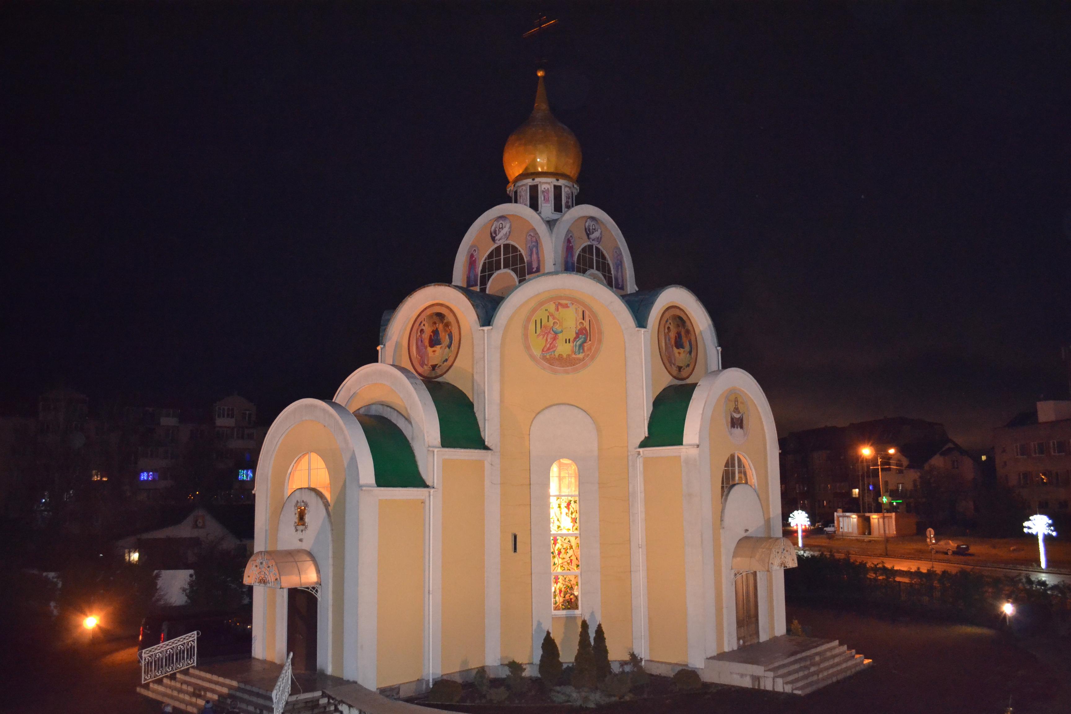 Современный храм постройки 2008 года